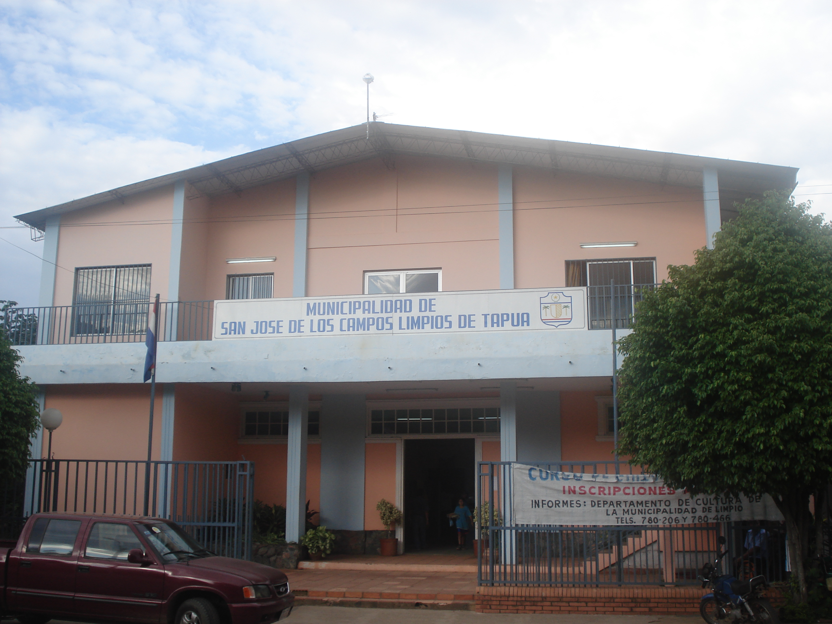 municipalidad